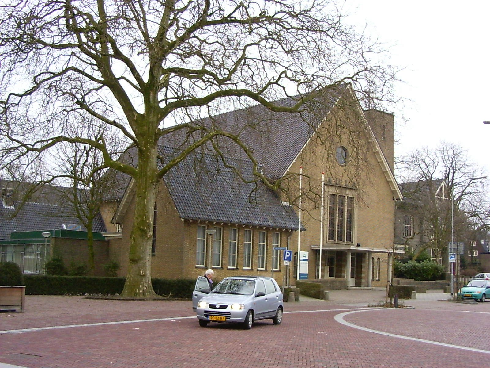 Aula